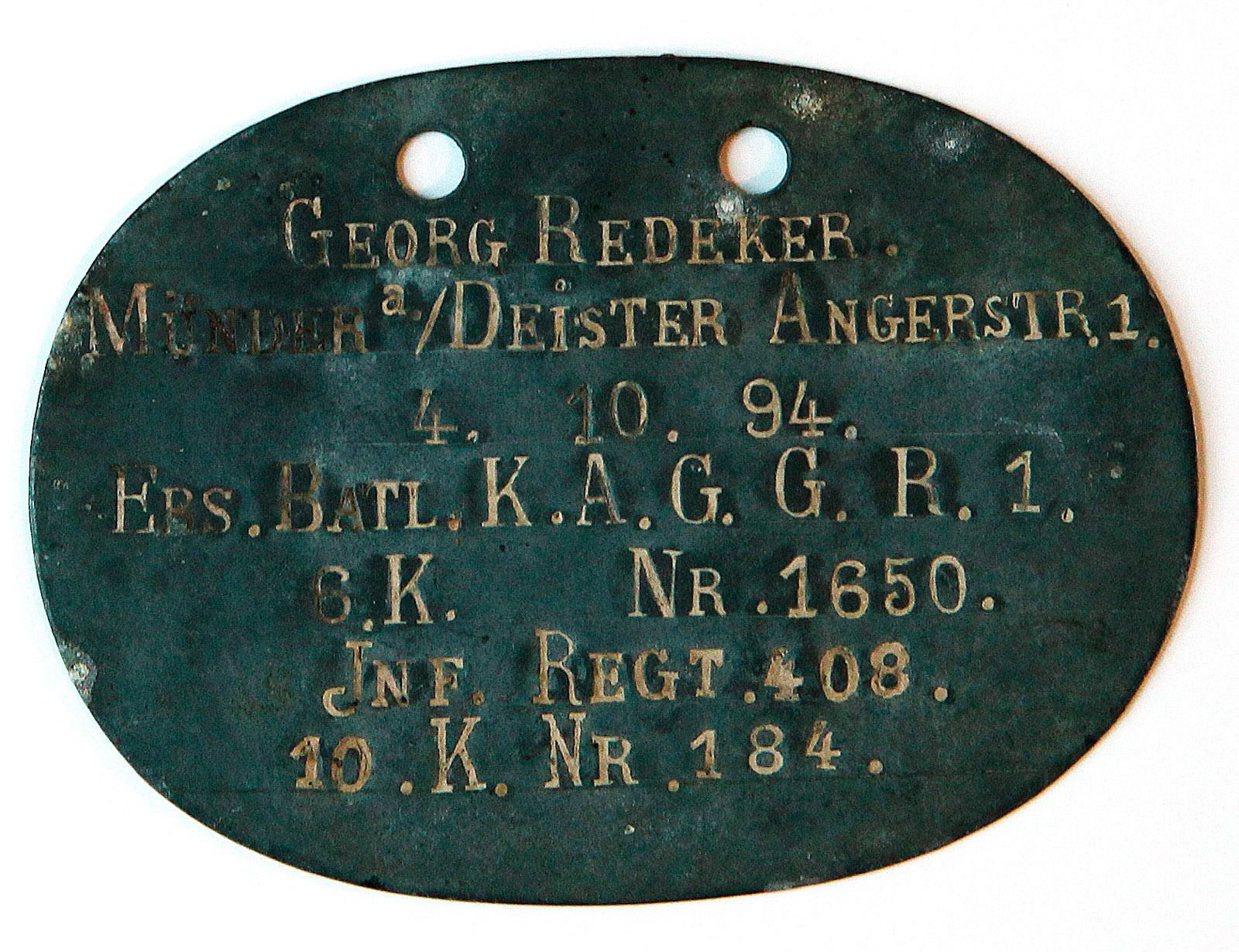 Erkennungsmarke des Vaters Georg Redeker George Redeker Münder a./Deister. Angerstr. 1. 4. 10. 94. Ers(t). Batl. K.A.G. G. R. 1. 6.K. Nr. 1650. Inf. Regt. 408. 10.K. Nr. 184. - siehe auch / also